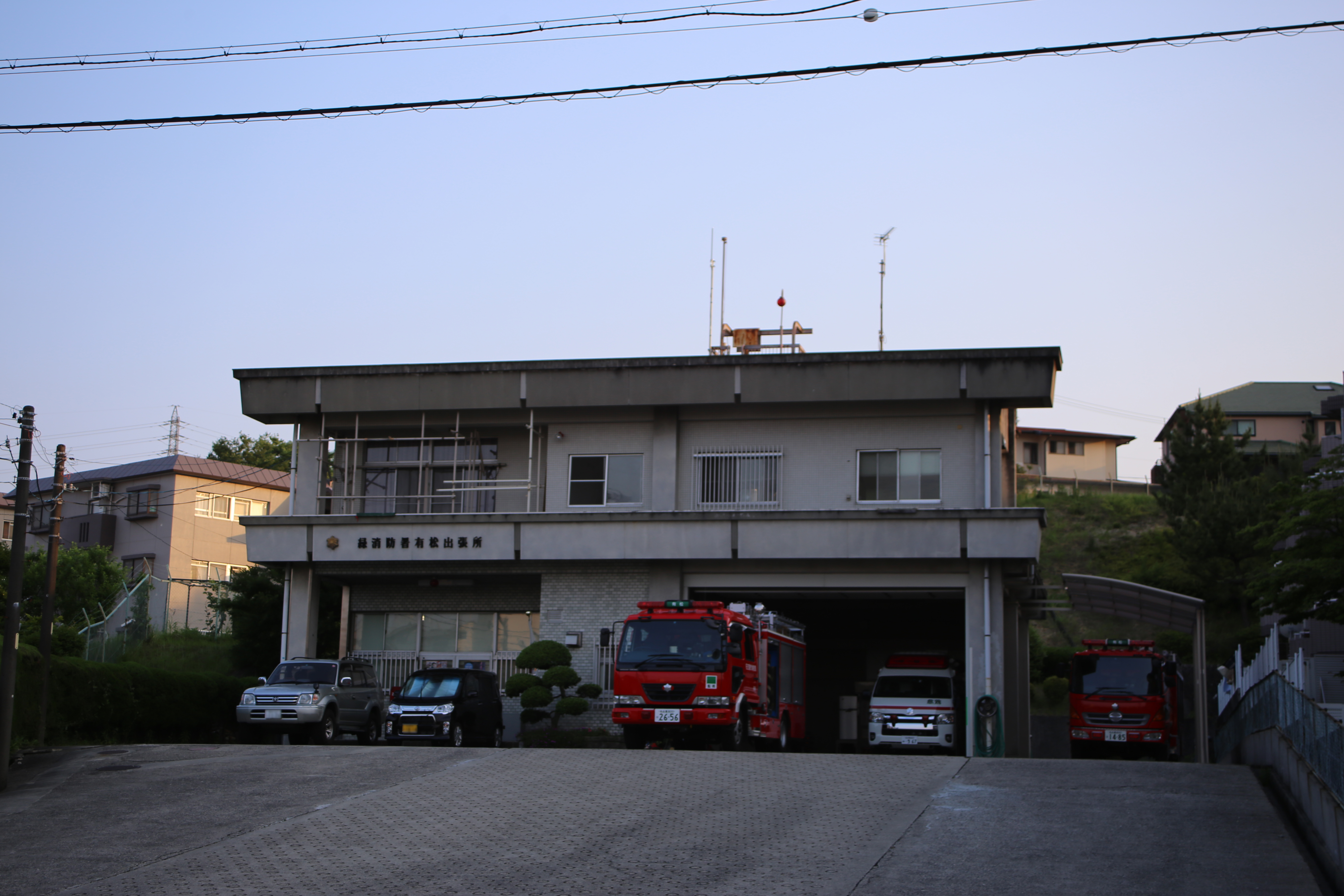 名古屋市緑区有松町の名古屋市消防局緑消防署有松出張所。ただし、ナンバープレートにつき画像処理済。